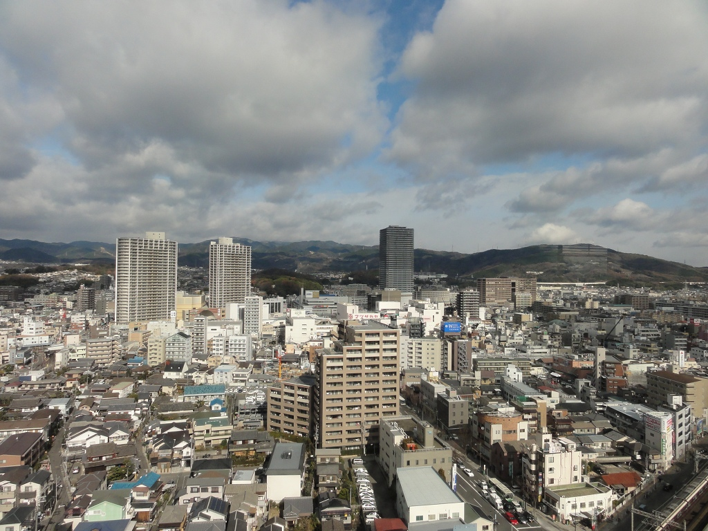 高槻市役所総合センター展望フロアからJR高槻駅方向を望む